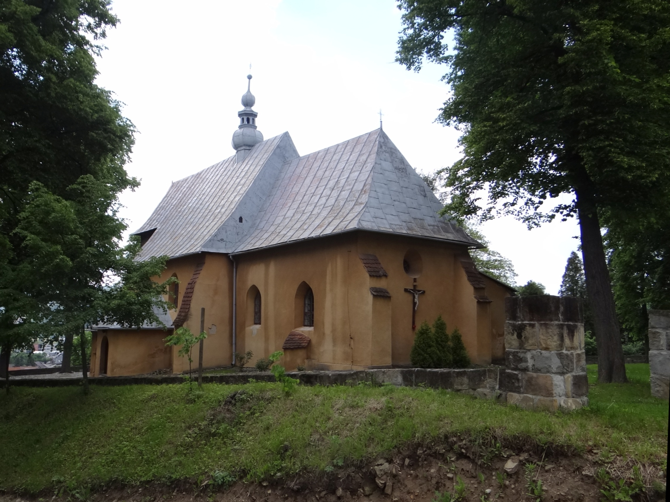 Wielogłowy - rzymskokatolicki kościół parafialny pw. Wniebowzięcia Najświętszej Marii Panny, 1318, XVII